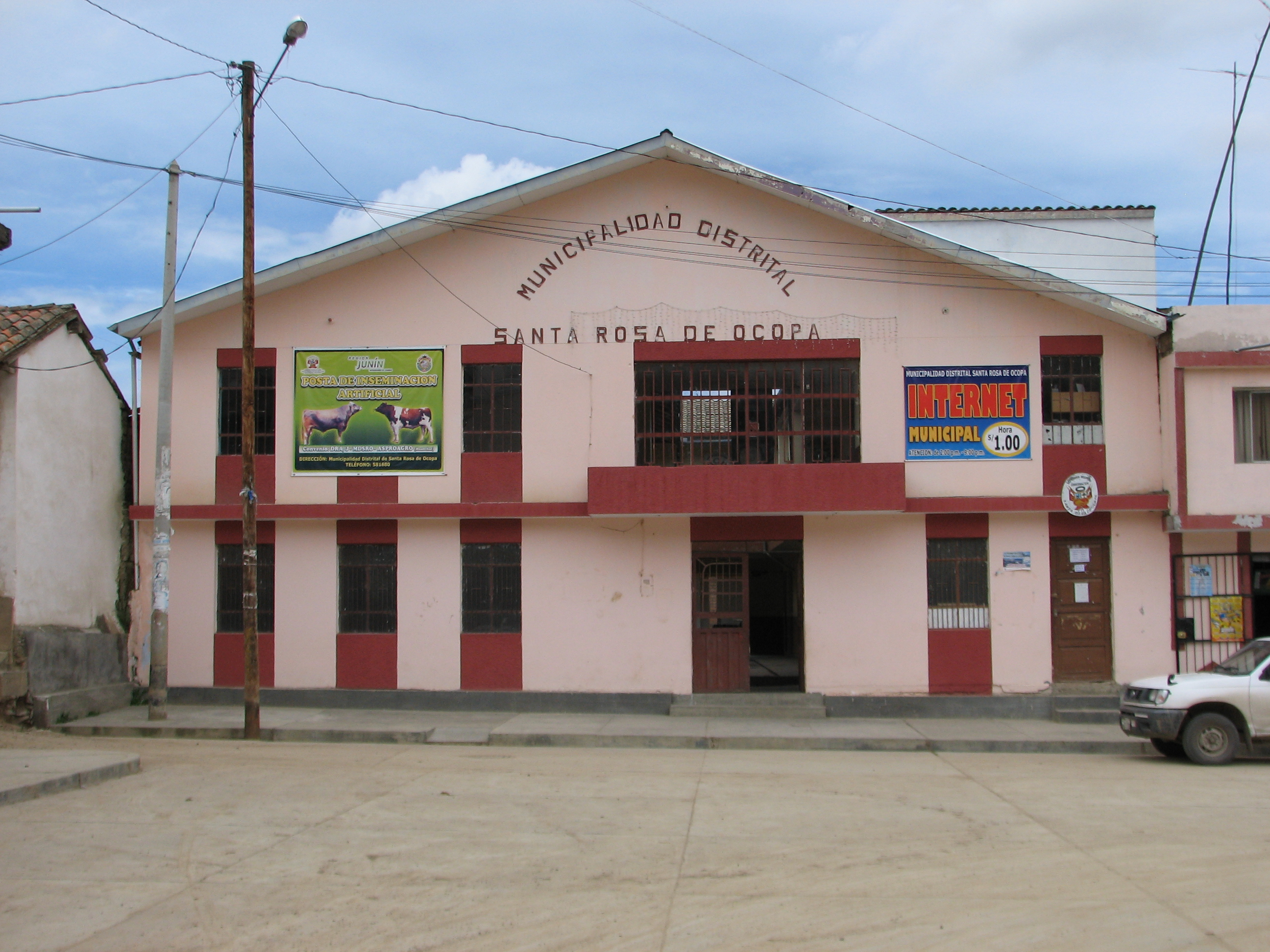 Municipalidad, Santa Rosa de Ocopa/Concepción/Junín, Peru.jpg